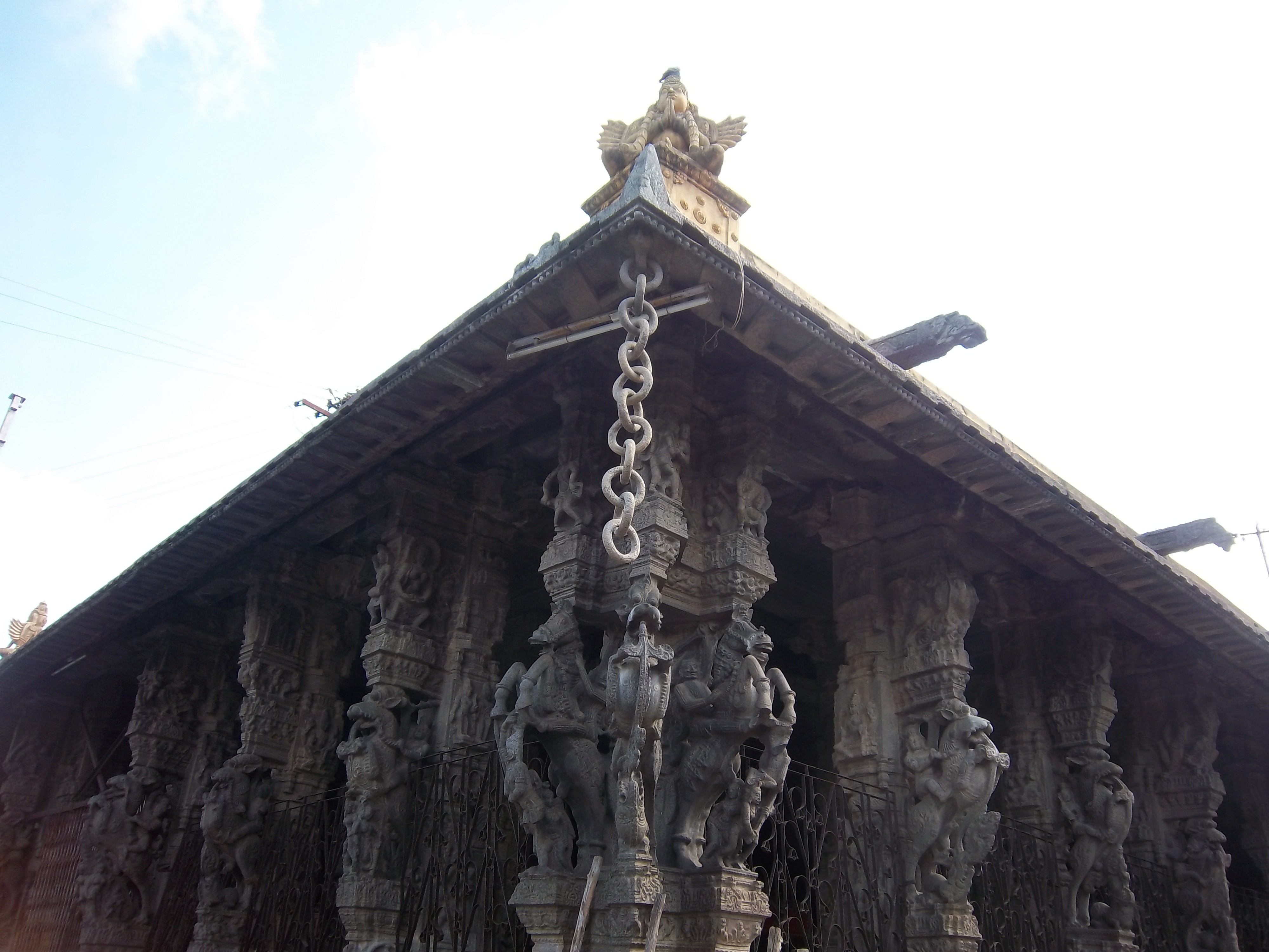 காஞ்சிபுரம் வரதராஜப்பெருமாள் கோயிலின் நூற்றுக்கால் மண்டபத்தில் தொங்கும் கல் சங்கிலி